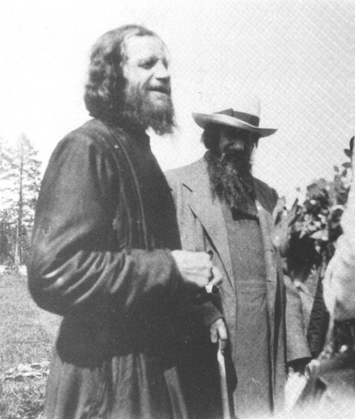 Последняя из известных фотографий о. Макария с Г.Е. Распутиным. Предположительно снимала А.А. Вырубова. Октайский скит.